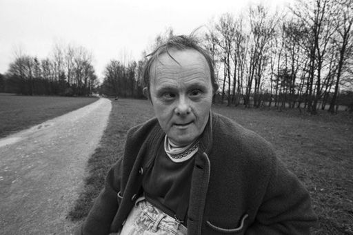 Walter Kistler überlebte die Nazizeit, da er von seinen Eltern versteckt wurde. Walter, 53 (Down-Syndrom). Erschienen in: ZEITmagazin, Nr. 37, 6. September 1996, S. 8-15